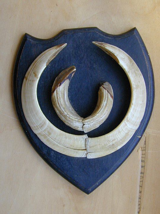 Eckzähne eines männlichen Wildschweins (Sus scrofa) als Jagdtrophäe, Waidmannsprache: Gewaff